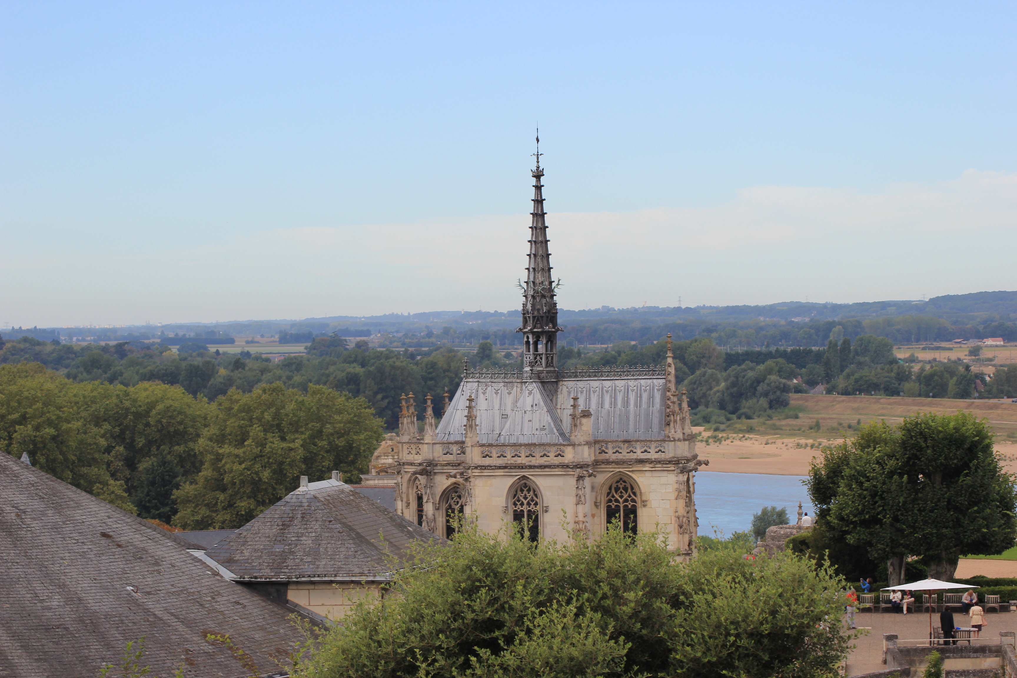 Chapelle Saint Hubert, château d'Amboise. Ci-gît Léonard de Vinci. .